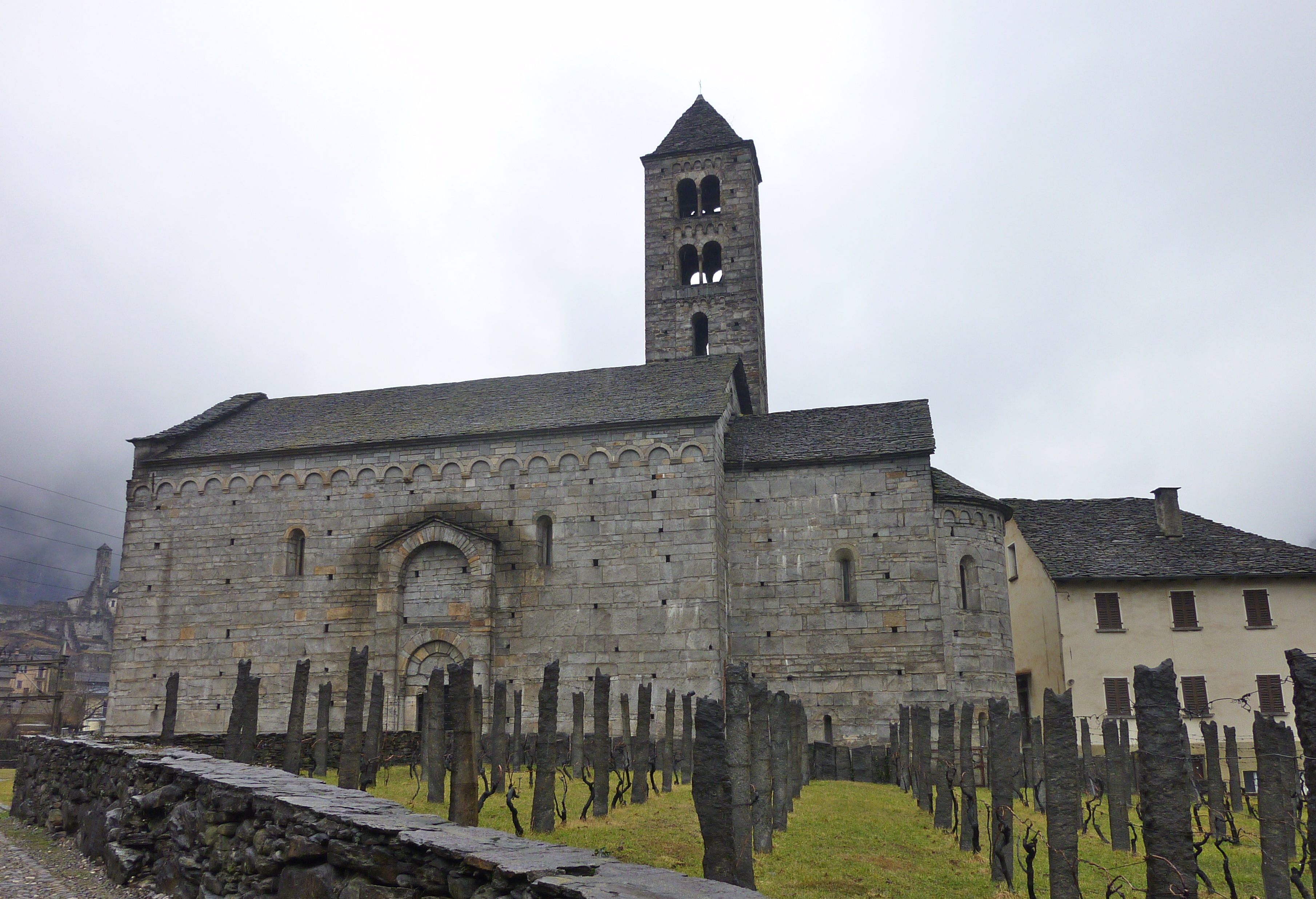 San Nicola (Giornico) Aussenansicht